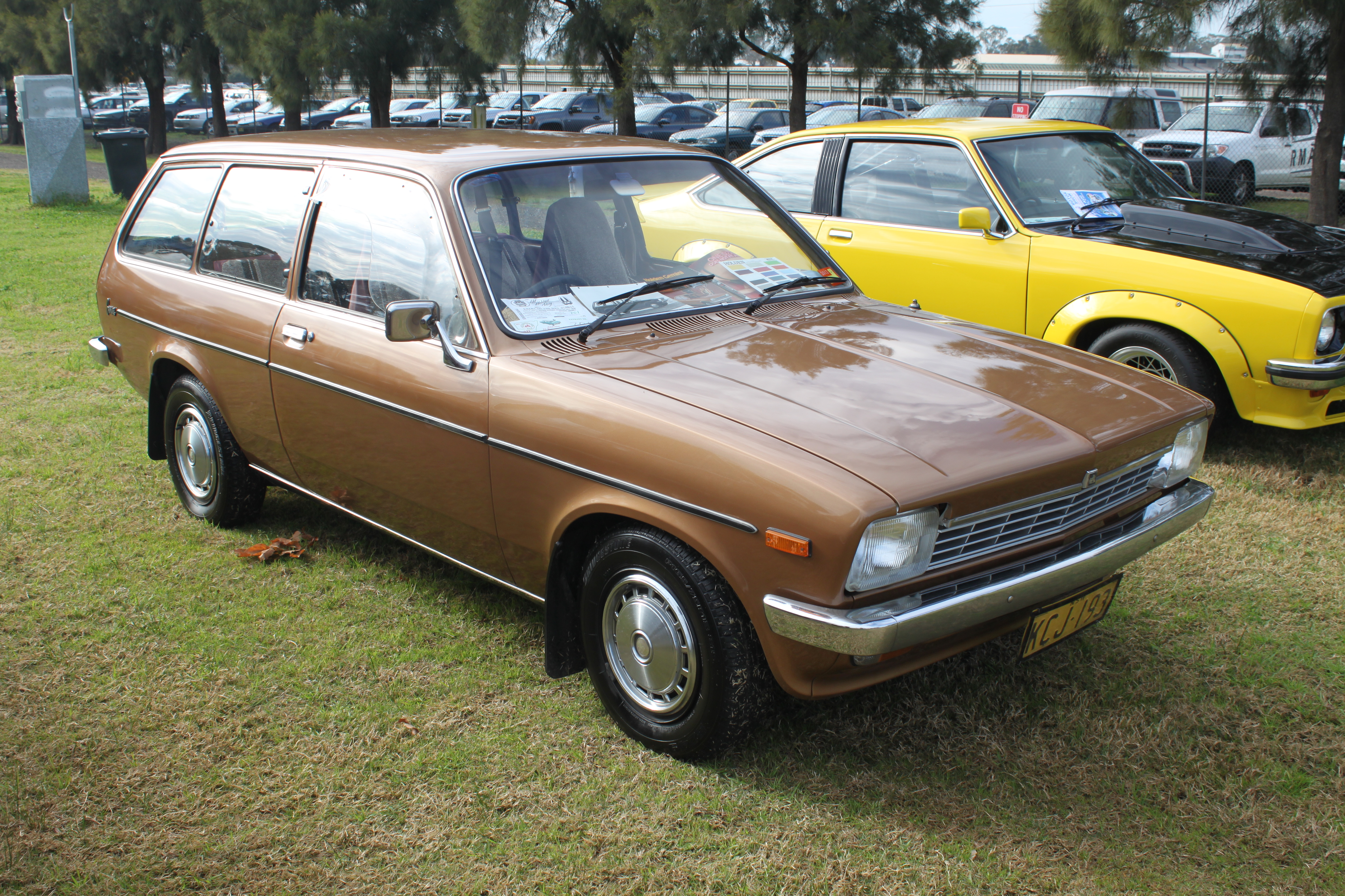 Holden Gemini TD Wagon